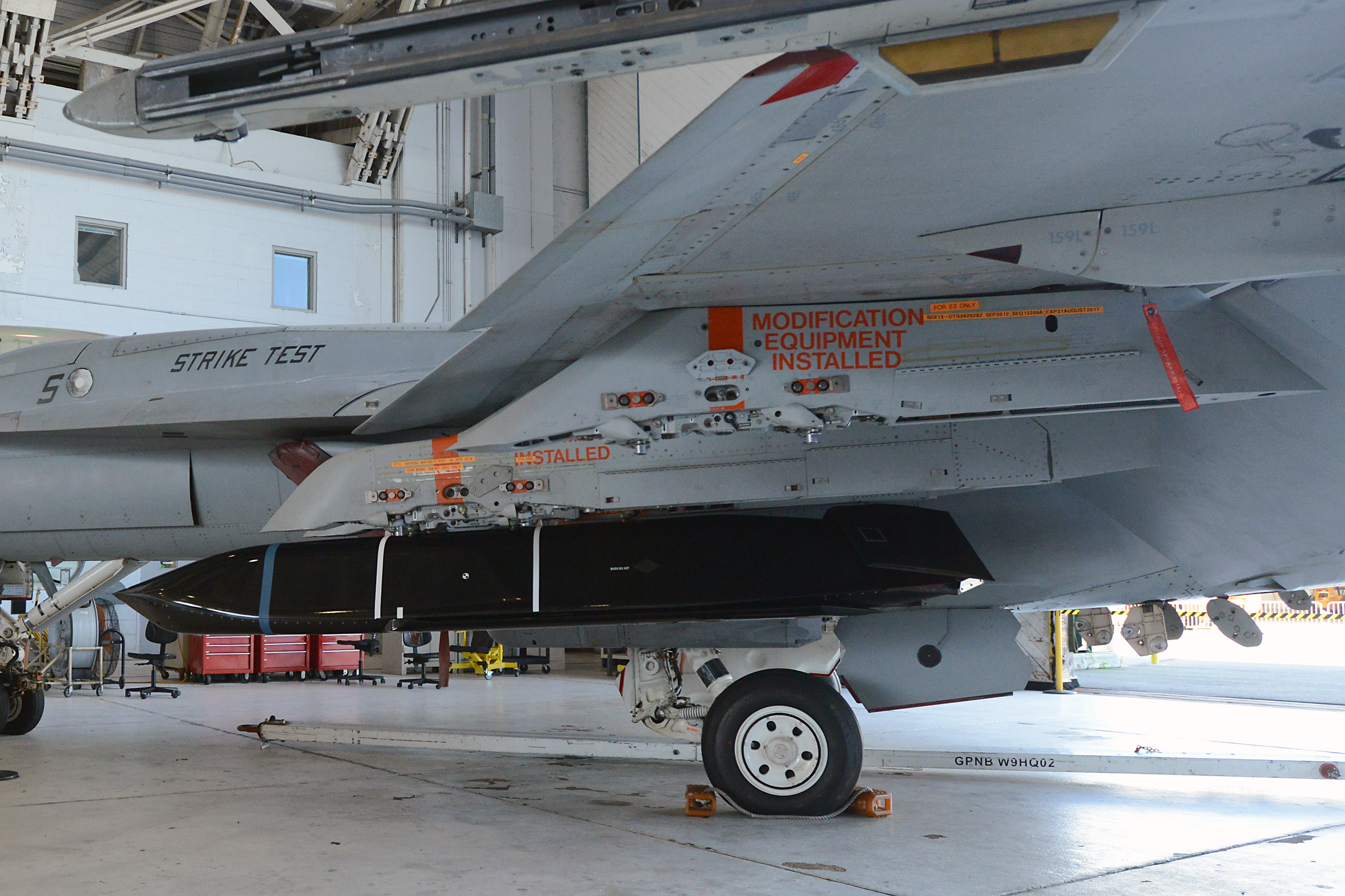 LRASM monté sur un F/A-18 Super Hornet du VX-23 le 12 aout 2015.